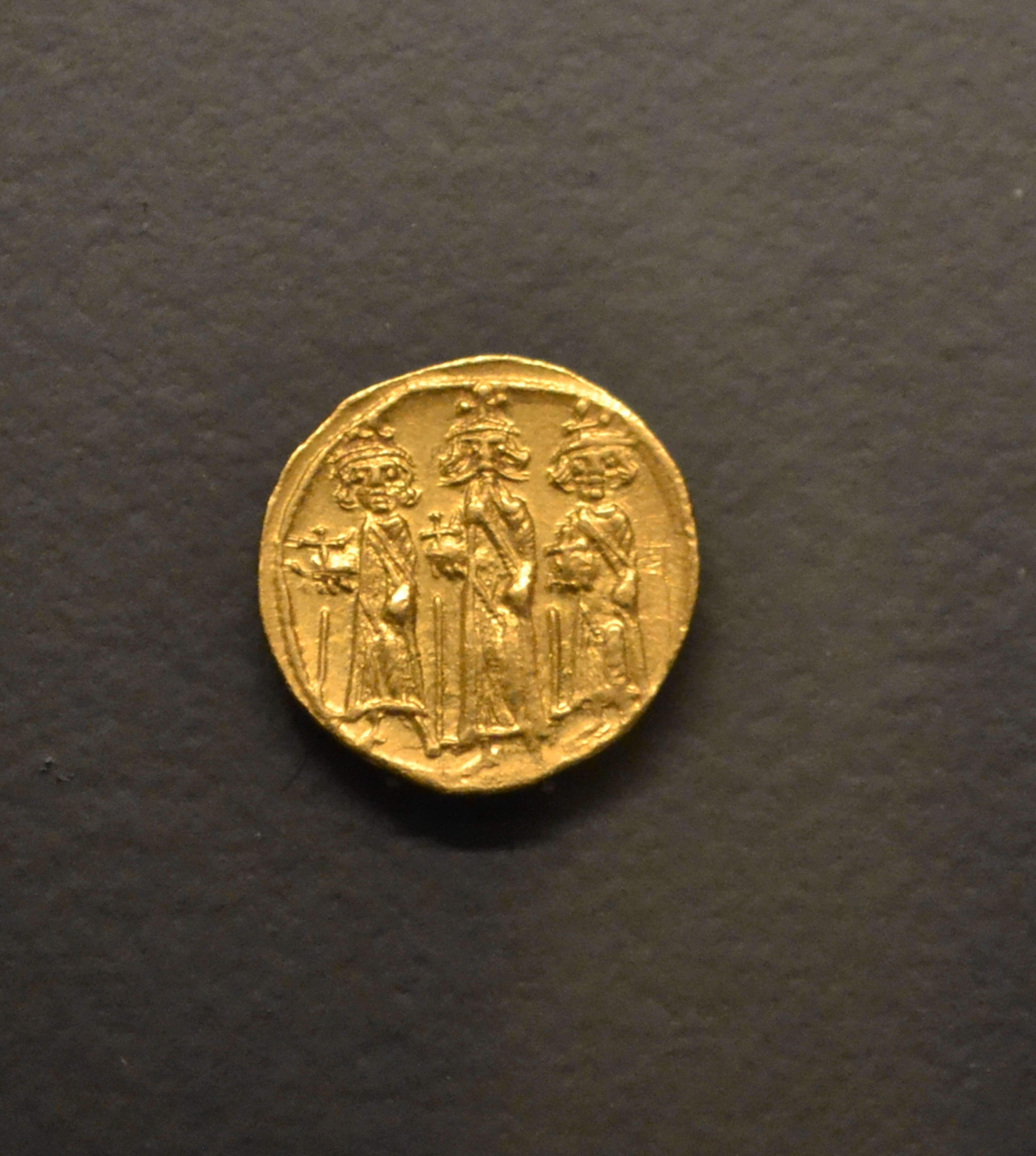 Moneda de oro de Bizancio (610-641). Museo de Prehistoria de Valencia.